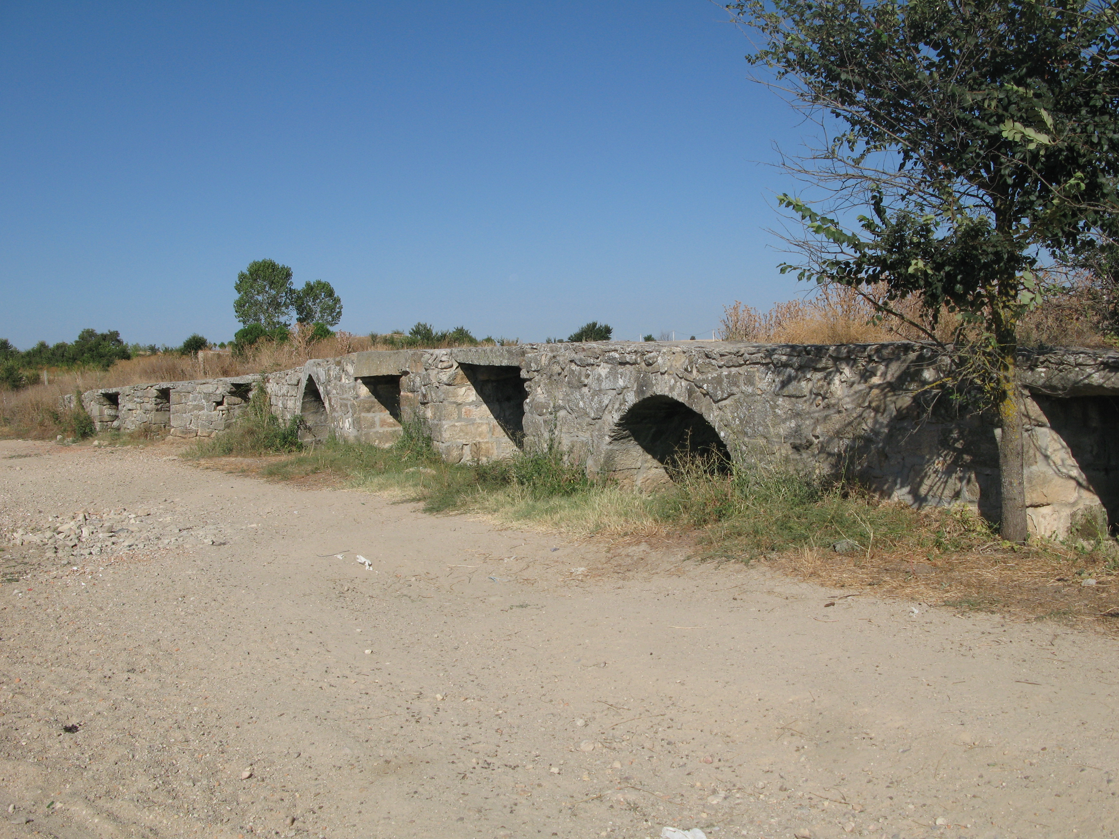 Puente medieval de Tamame (Peñausende, provincia de Zamora, España)